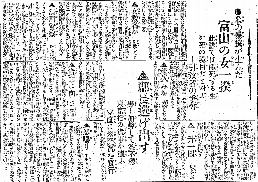 1918年（大正7年）8月に富山県中新川郡東水橋町及び西水橋町並びに同郡滑川町にて起った米騒動を報ずる新聞記事